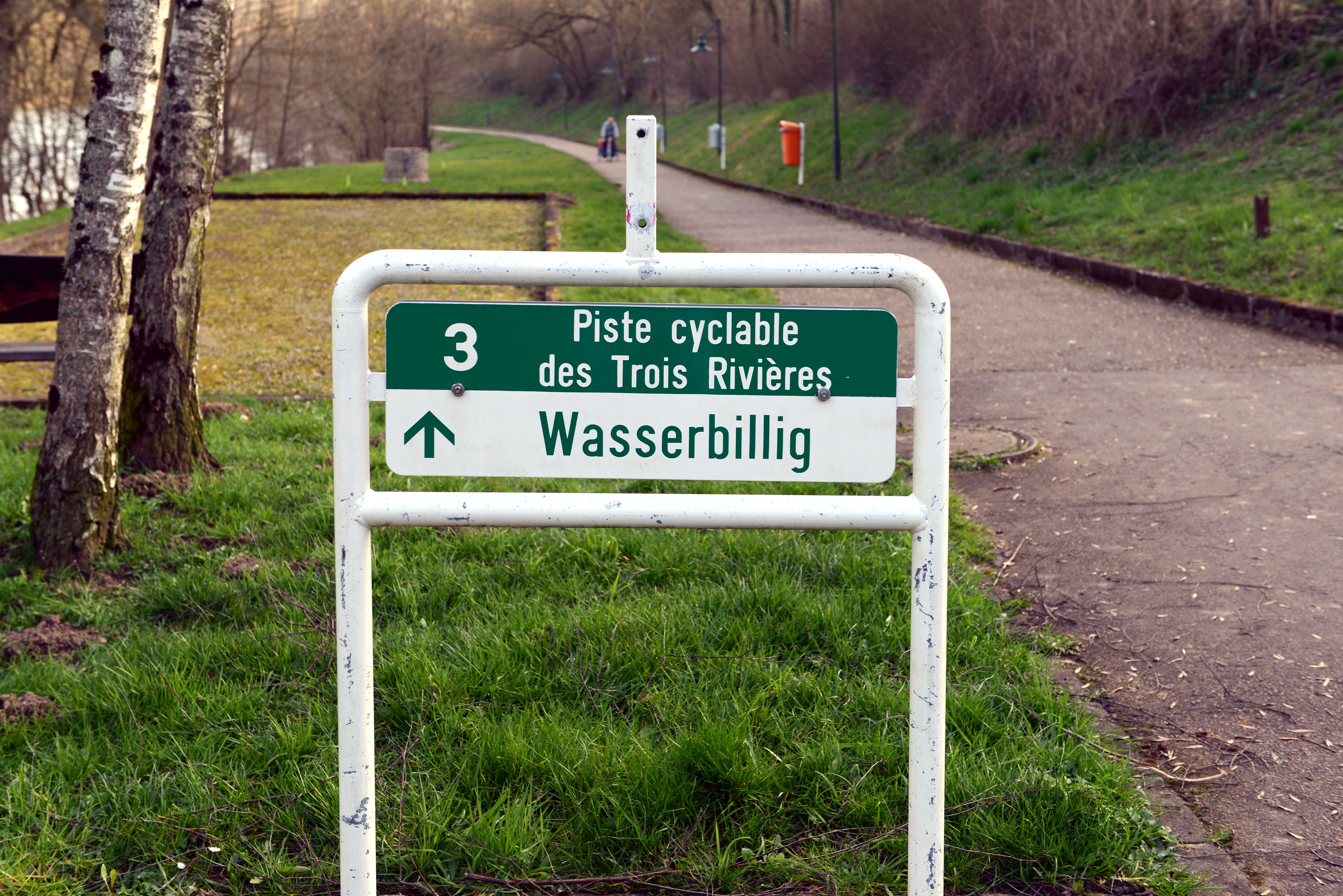 D'Vëlospist PC3 am Millewee zu Méischdref.